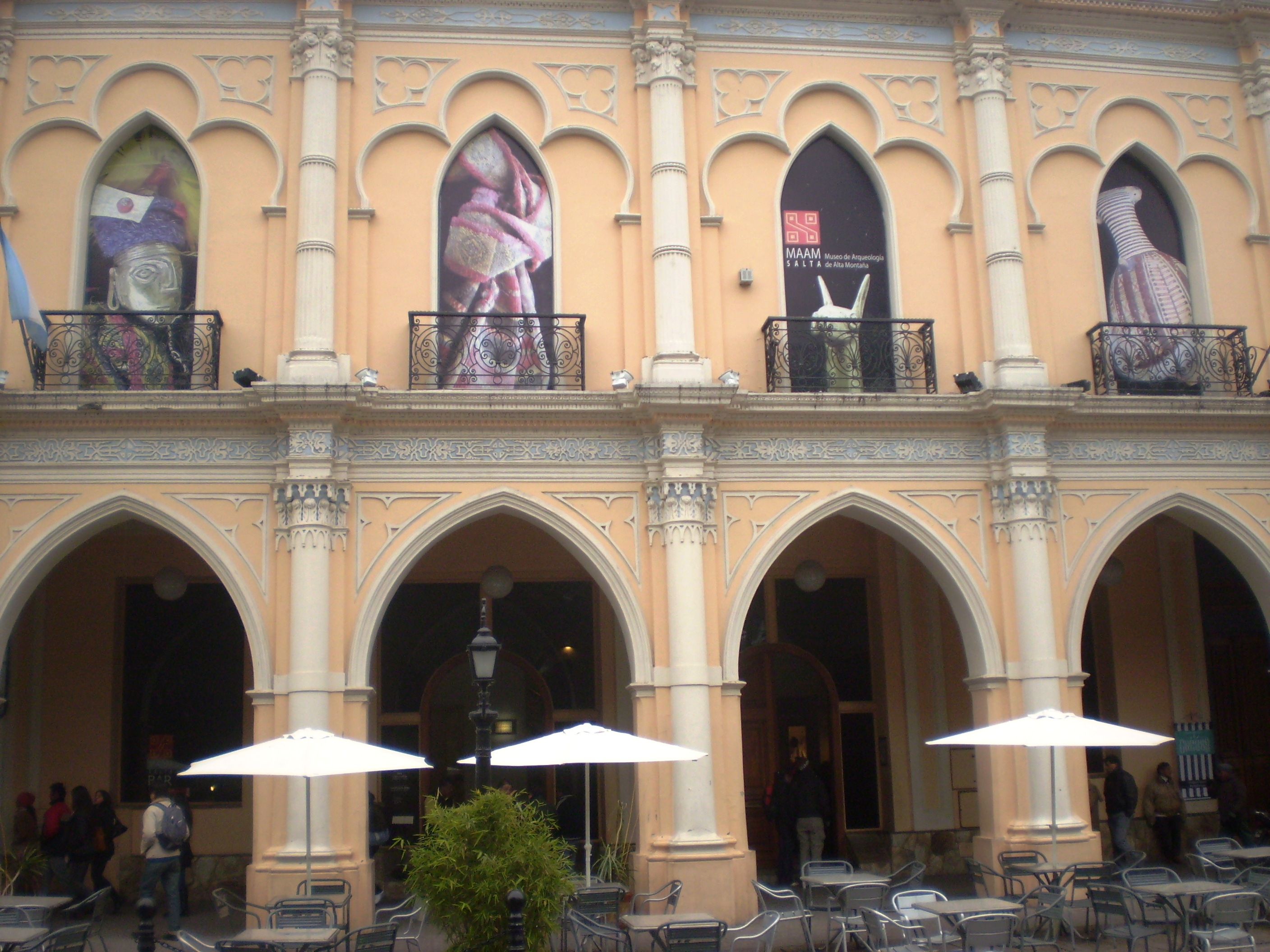 Fachada del Museo Arqueológico de Alta Montaña. MAAM. Salta, Argentina